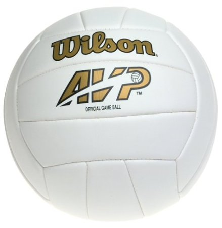 La palla usata nel film